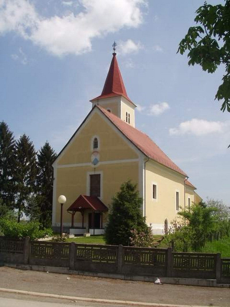 Rakovec - Church front view